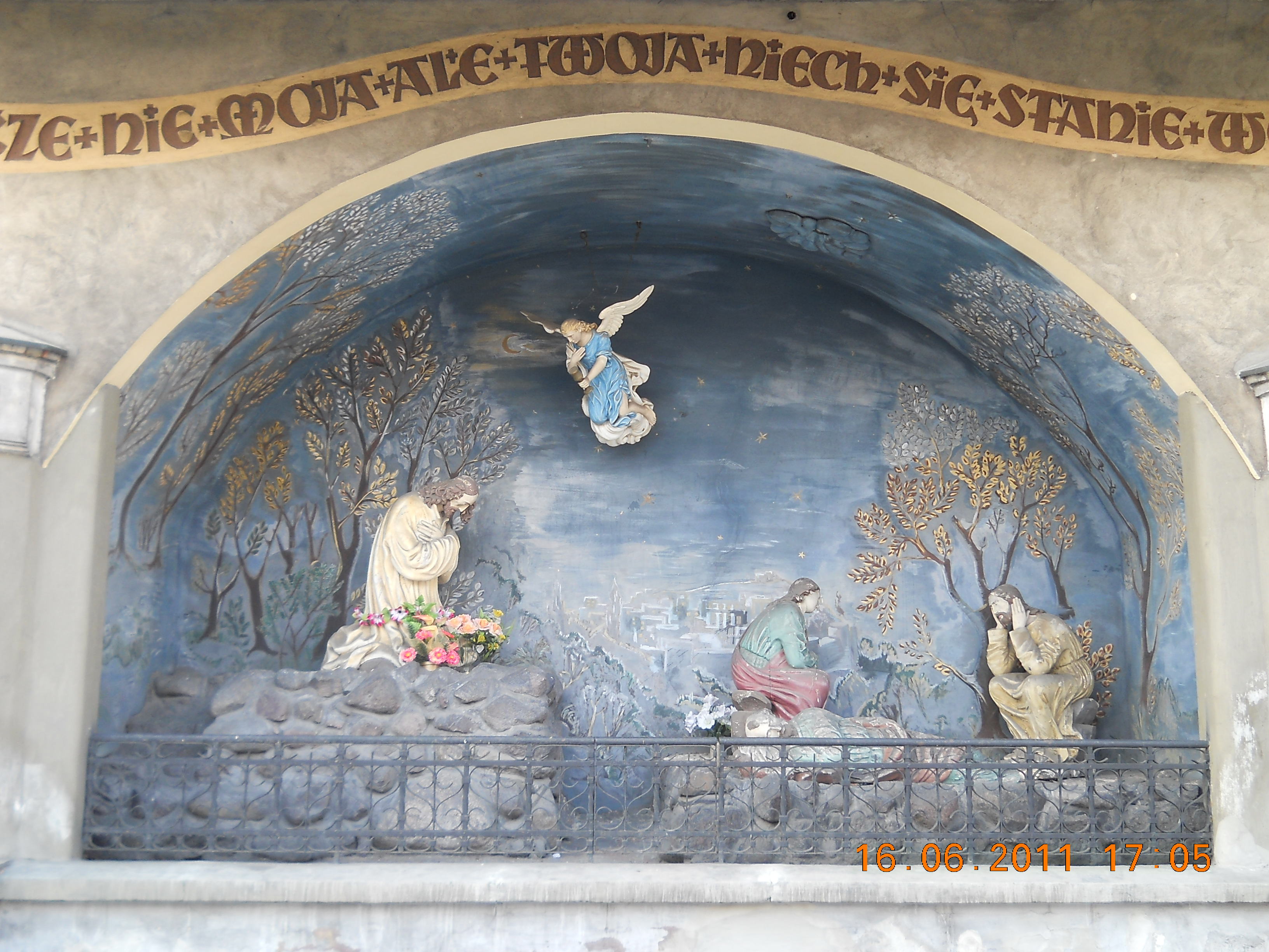 kościół par. p.w. św. Mikołaja - scena na górze oliwnej - Pyskowice, ul. Poniatowskiego